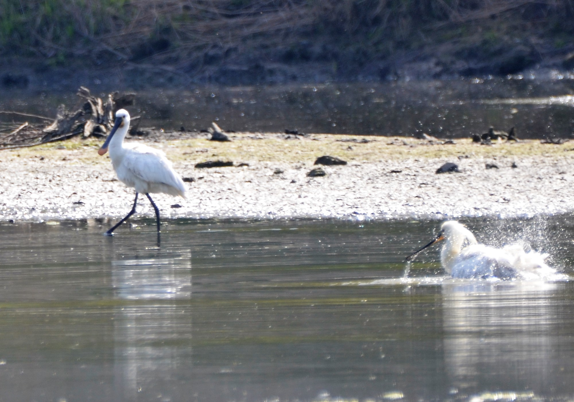 Deux Spatule blanche en alte migratoire sur le marais de la Marque